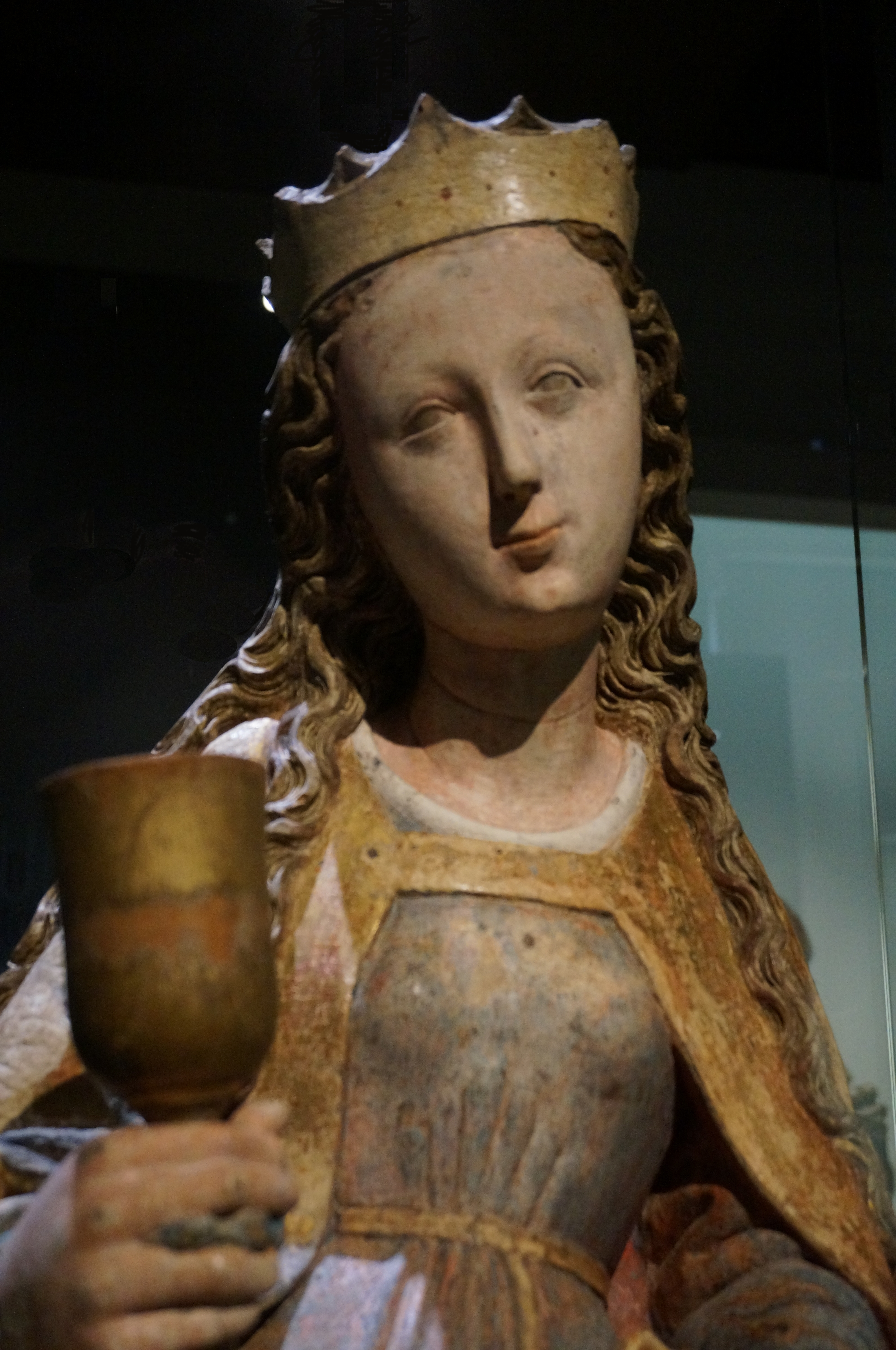 lors de l'exposition sculptures souabes de la fin du moyen âge du musée de CLuny.